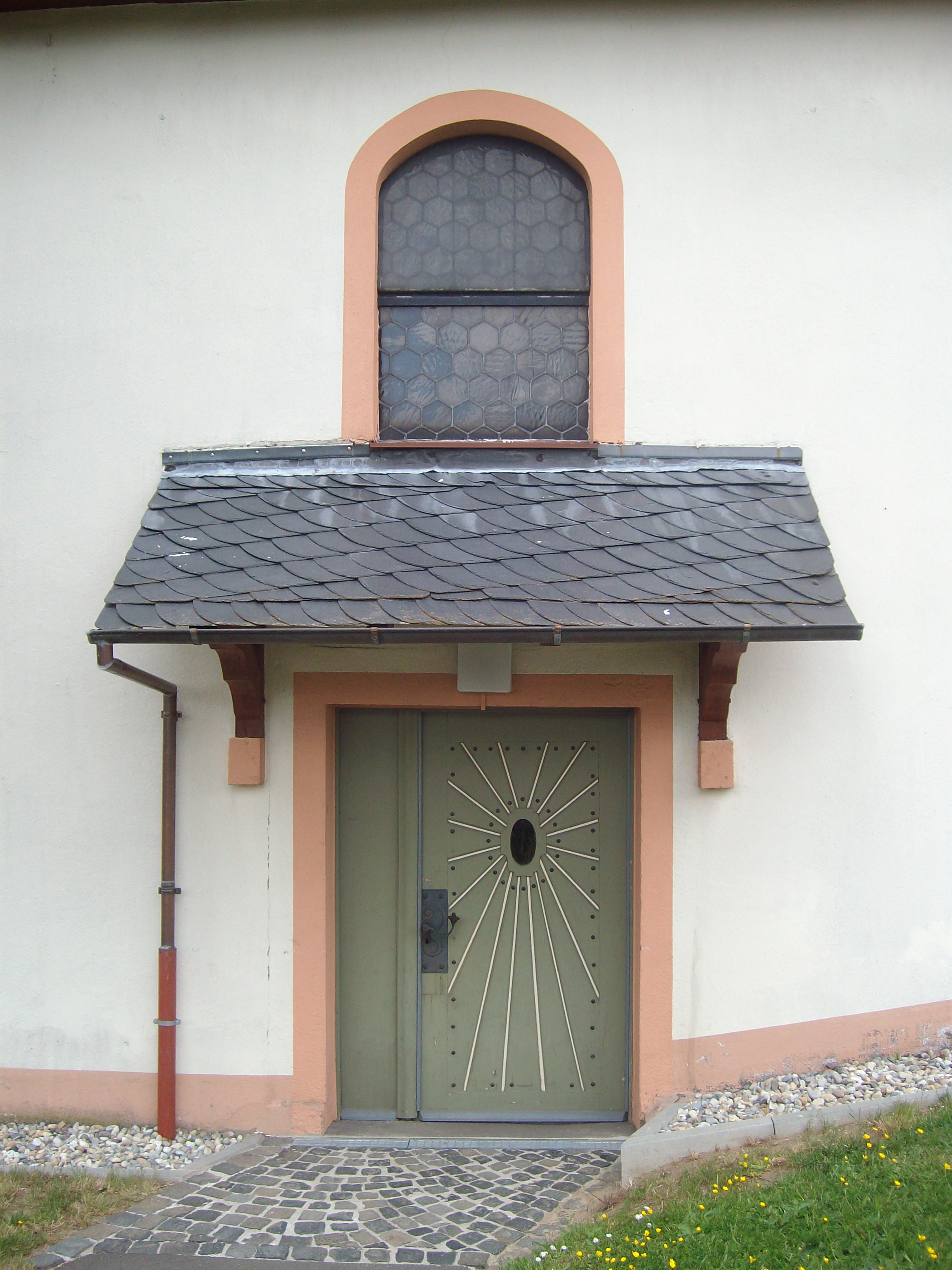 Eingangsportal der Evangelischen Kirche Stangenrod, Grünberg, Landkreis Gießen, Hessen, Deutschland